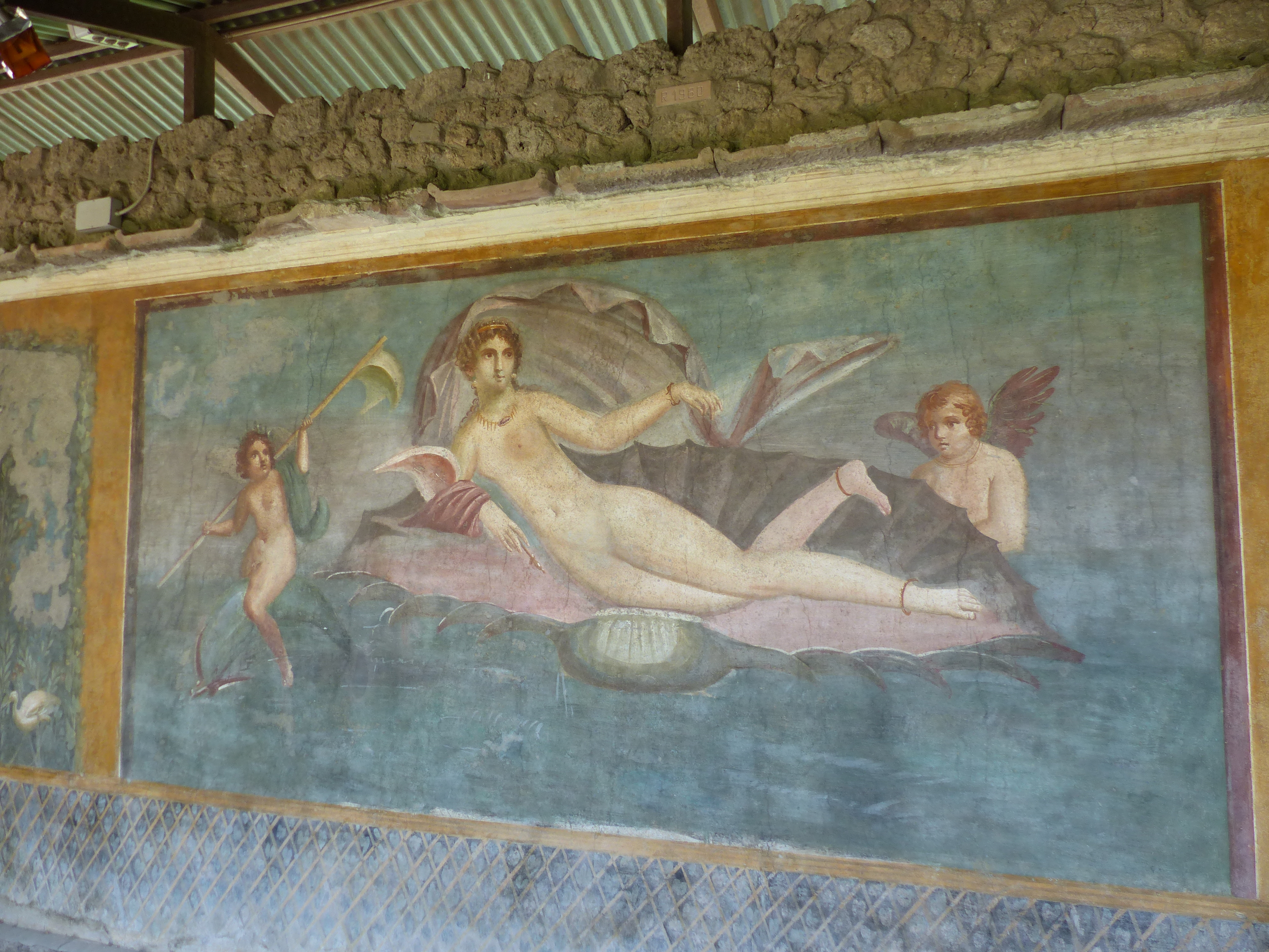 Casa de la Venus en la concha